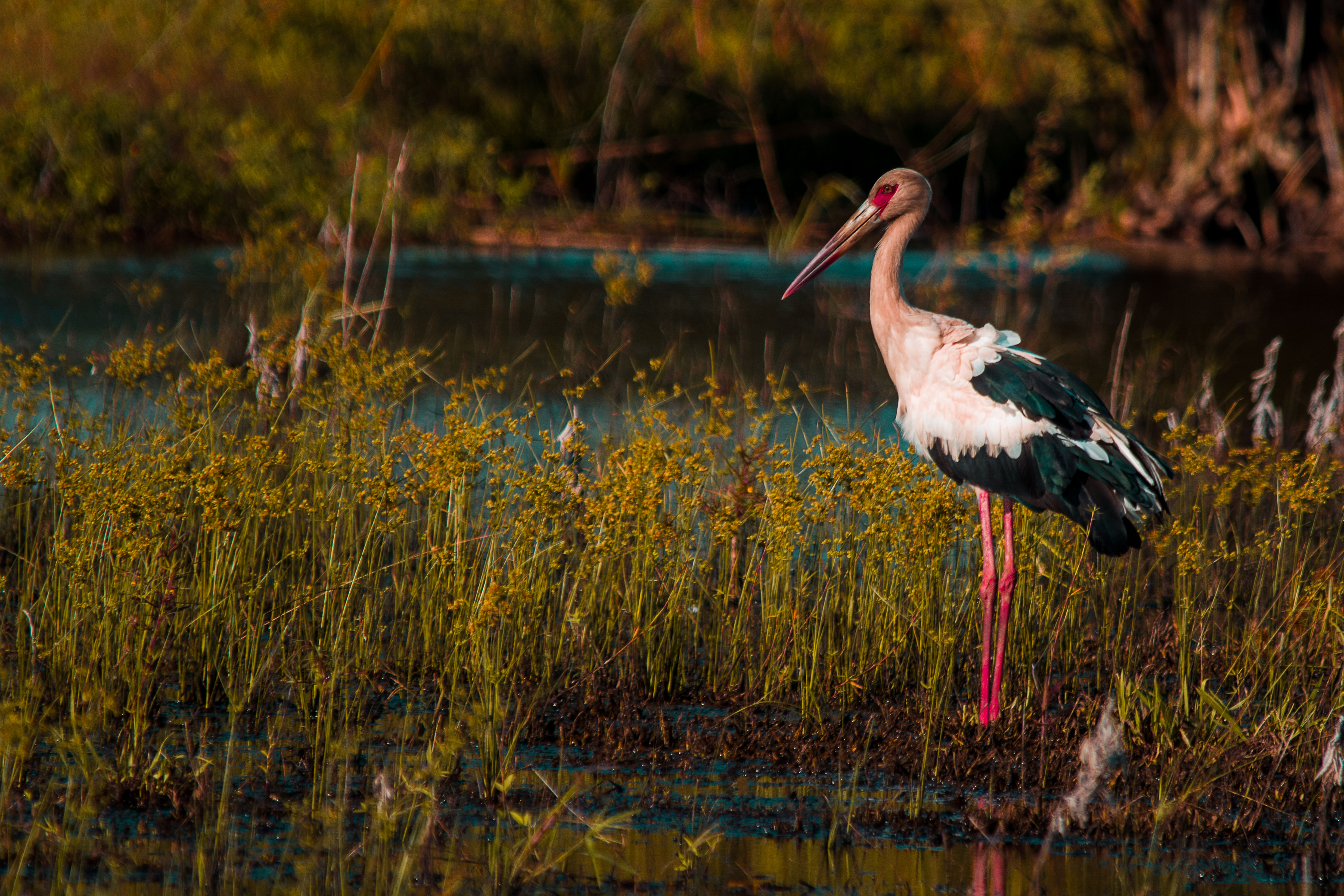 A ave desbrava um pequeno lago à beira da estrada que liga o Distrito de Campinal à cidade de Presidente Epitácio-SP.